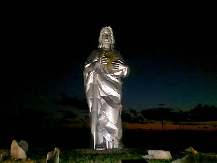 Sagrado Corazón de Jesus